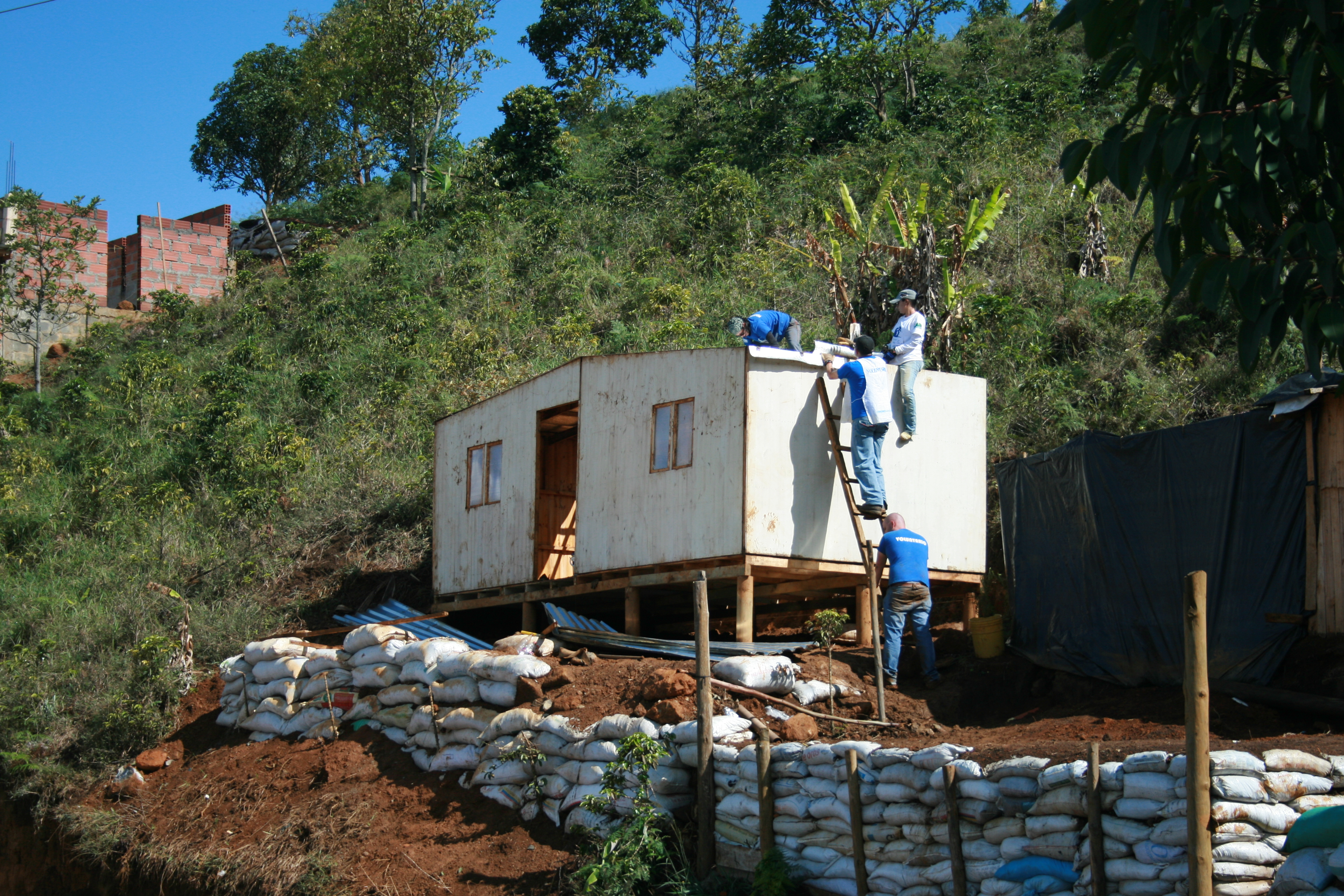 Eine TECHO Notbehausung, von Freiwilligen in Kolumbien gebaut.